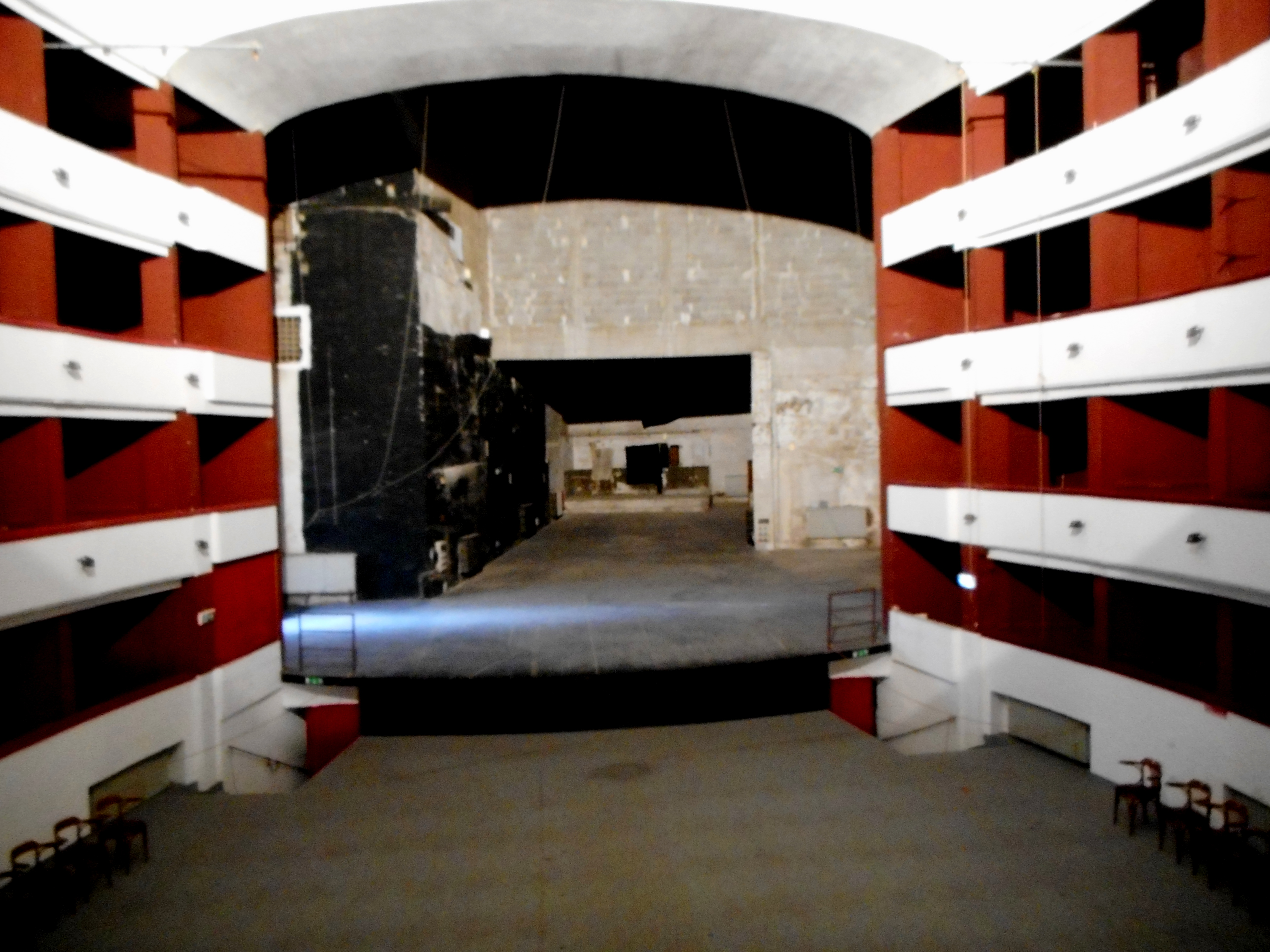 Interno del Teatro Bellini verso il palcoscenico